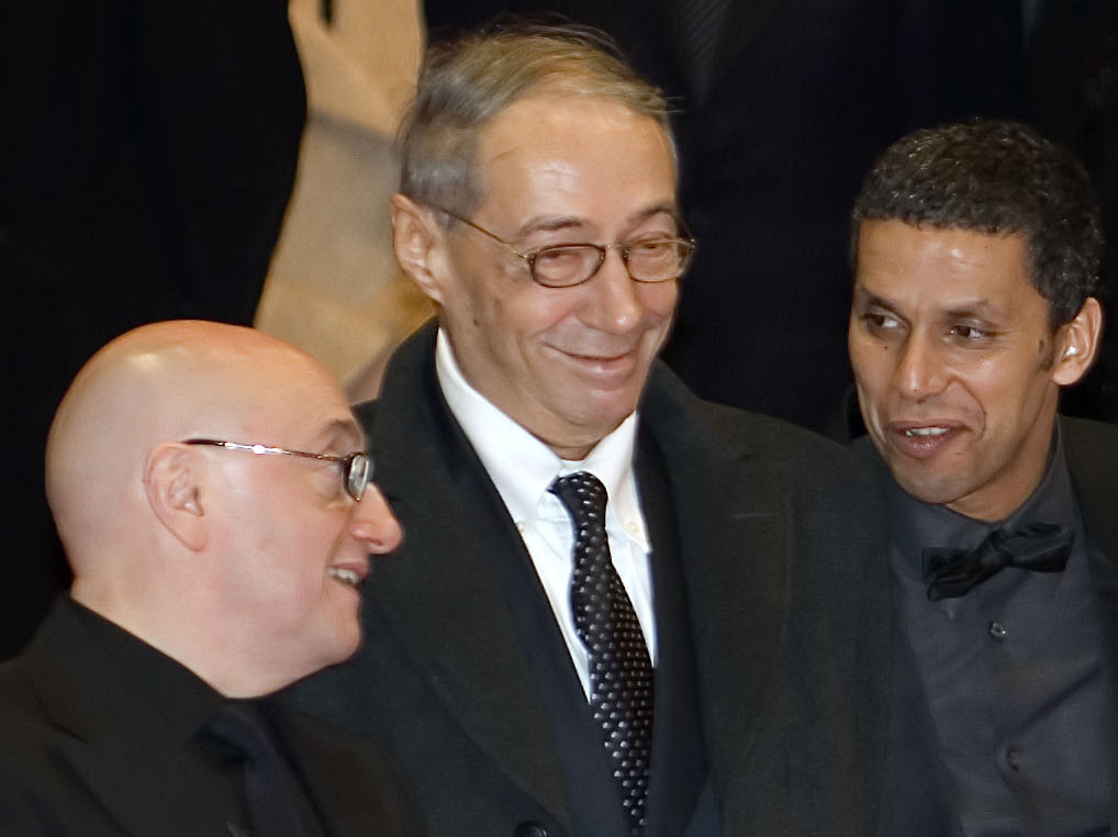 Michel Blanc, André Téchiné, Sami Bouajila, arrival for the premiere of "Les Témoins" ("The Witnesses", Die Zeugen"), Berlinale palace, Potsdamer Platz, Berlin